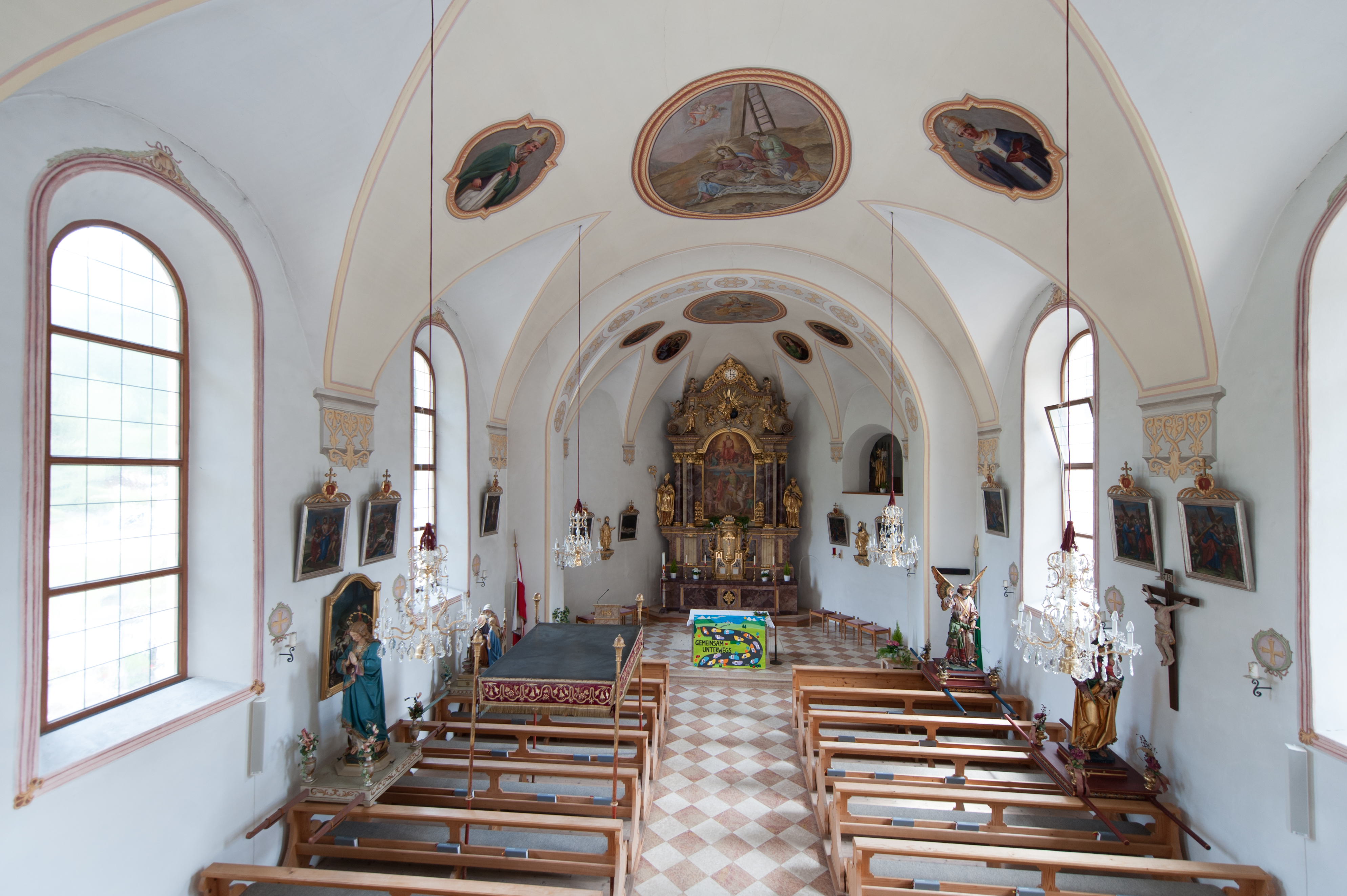 Wiki takes Nordtiroler Oberland: Kirchplatz Huben This media shows the remarkable cultural object in the Austrian state of Tyrol listed by the Tyrolean Art Cadastre with the ID 20493. (on tirisMaps, pdf, more images on Commons)